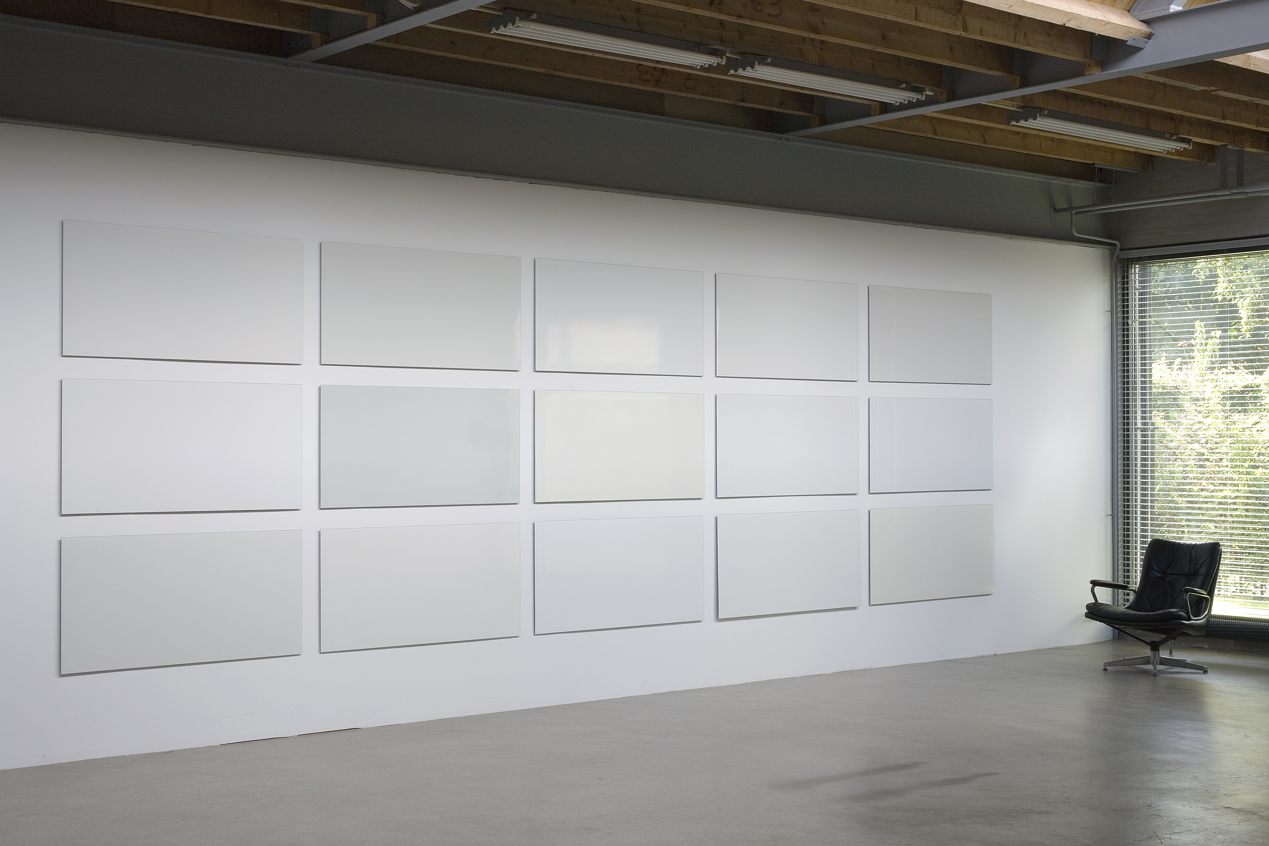 15 “Meierwitten” 2007, emaille op plaatstaal, 15 x 60 x 60 cm kleuren naar het pallet ´Richard Meier 30 colors` voor Sikkens privécollectie